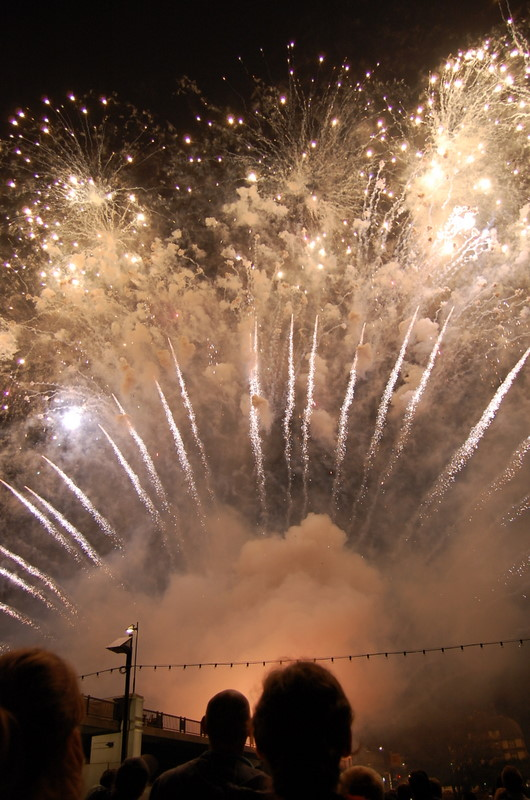 Feuerwerk zum Abschluß des Museumsuferfestes Frankfurt/Main, August 2007. Am nördlichen Brückenkopf der Untermainbrücke. andere Versionen